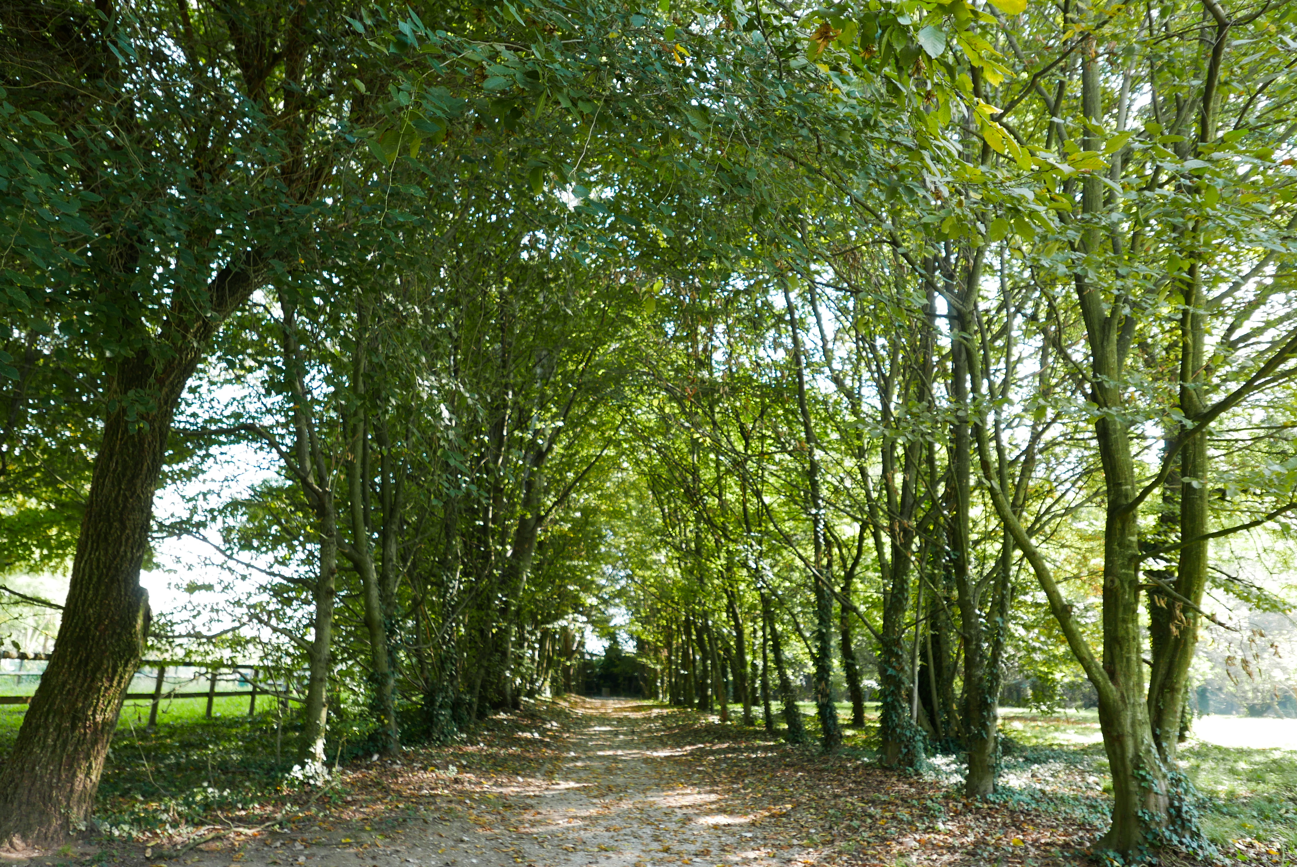 Campedello - Oasi Valletta del Silenzio